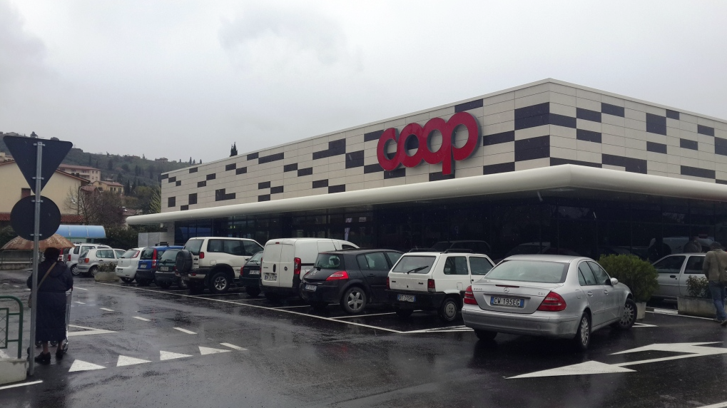 l 27 marzo viene riaperto dopo una completa ristrutturazione lo storico supermercato Coop di Castiglion Fiorentino.